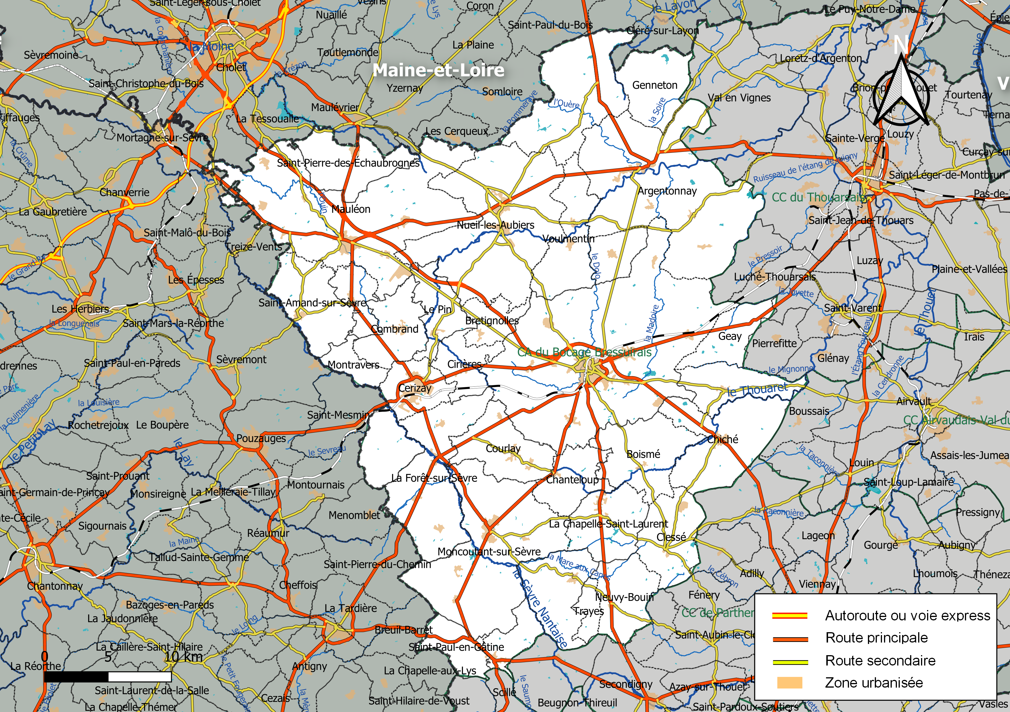 Carte géographique de la Communauté d'agglomération du Bocage Bressuirais, département des Deux-Sèvres, France. Composition au 1er janvier 2019.